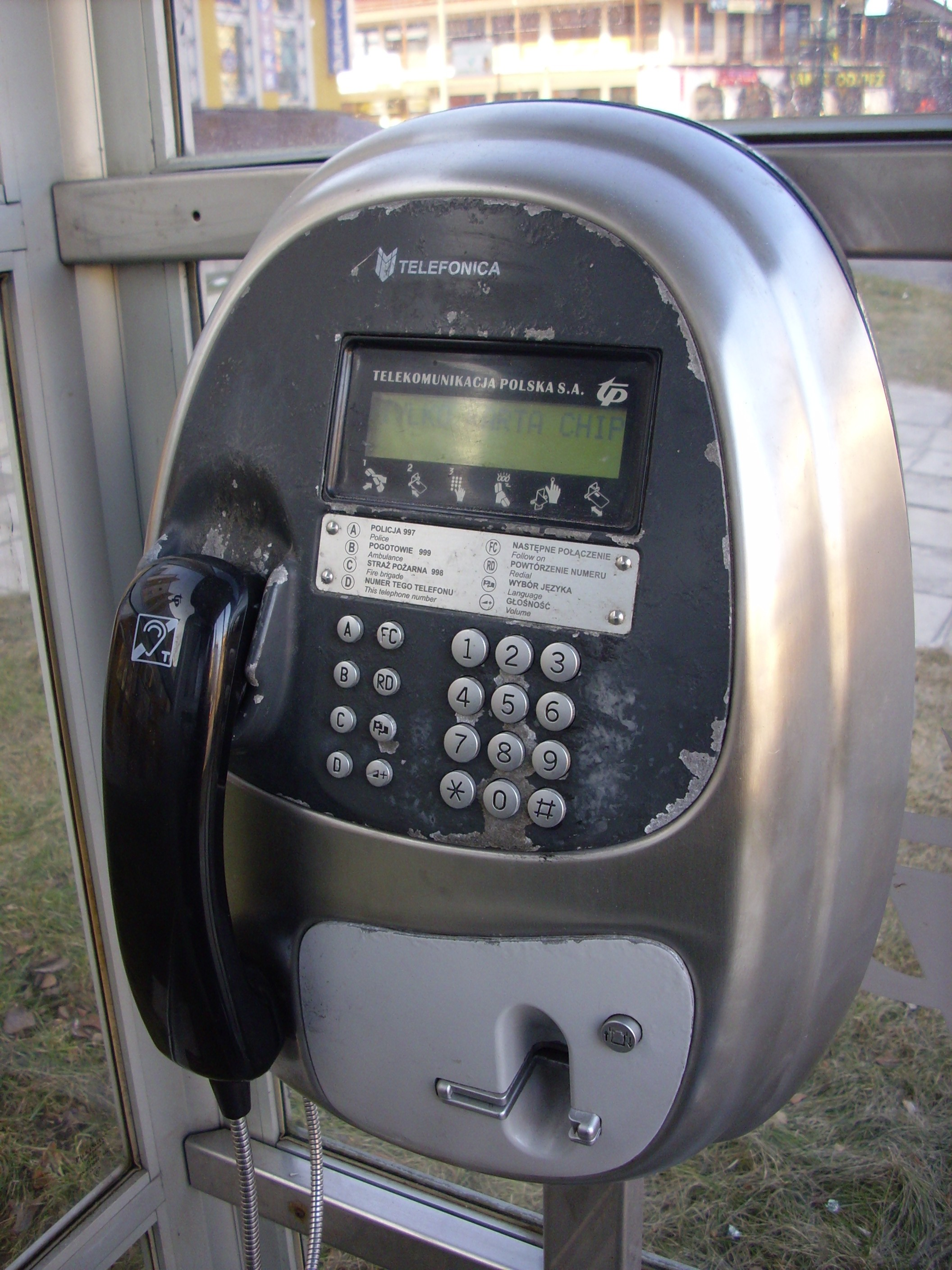 Automat telefoniczny typu CTP-I zainstalowany w nieistniejącej już budce telefonicznej w Białej Podlaskiej przy ul. Terebelskiej.